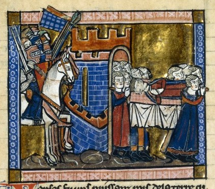 Funérailles de Baudouin Ier